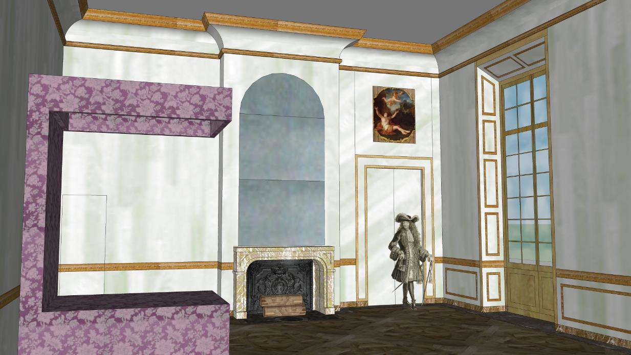 Schéma restituant le volume de la chambre de la princesse de Conti à Meudon, vers 1705.